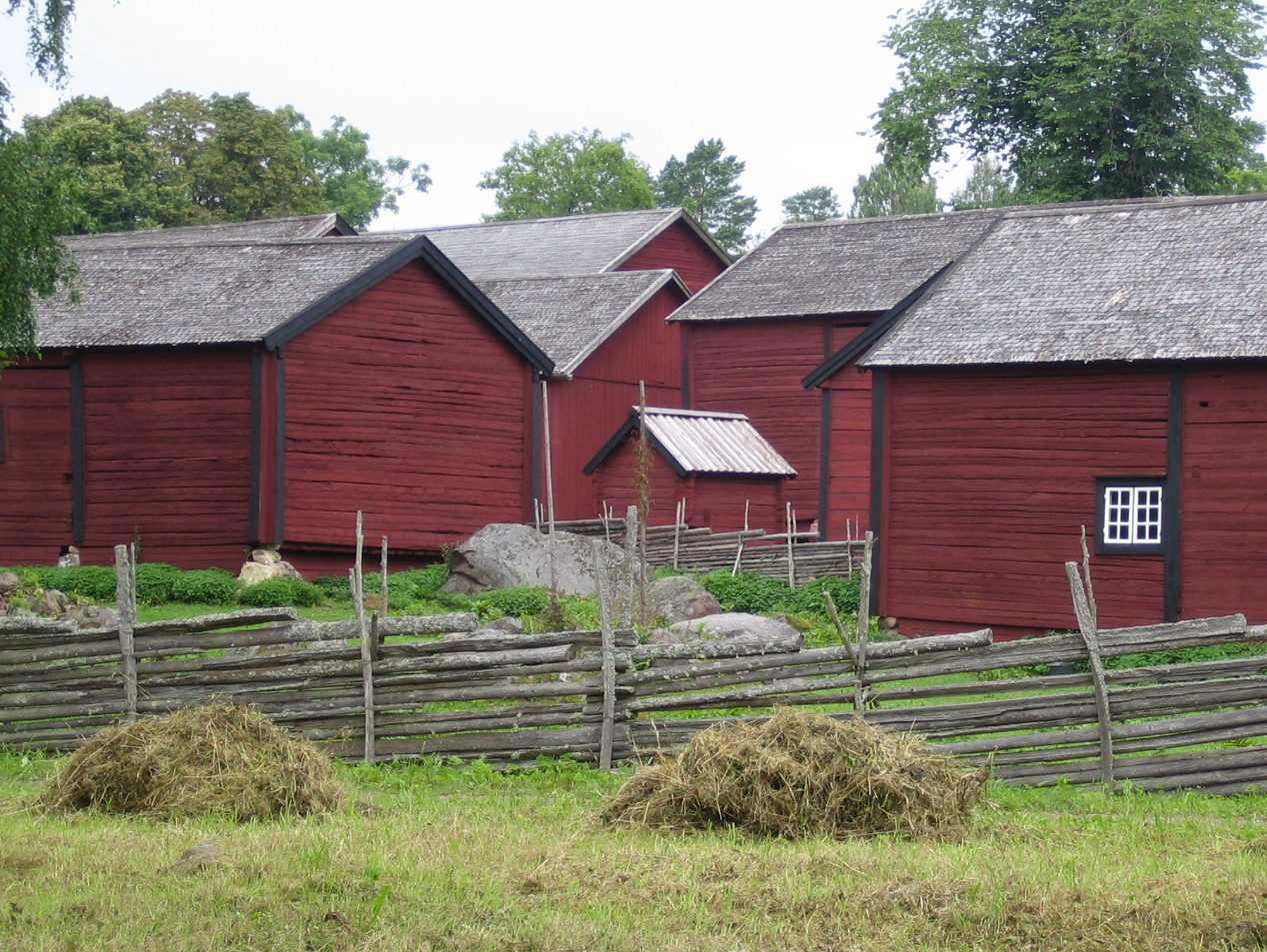 Stensjö by, Oskarshamns kommun